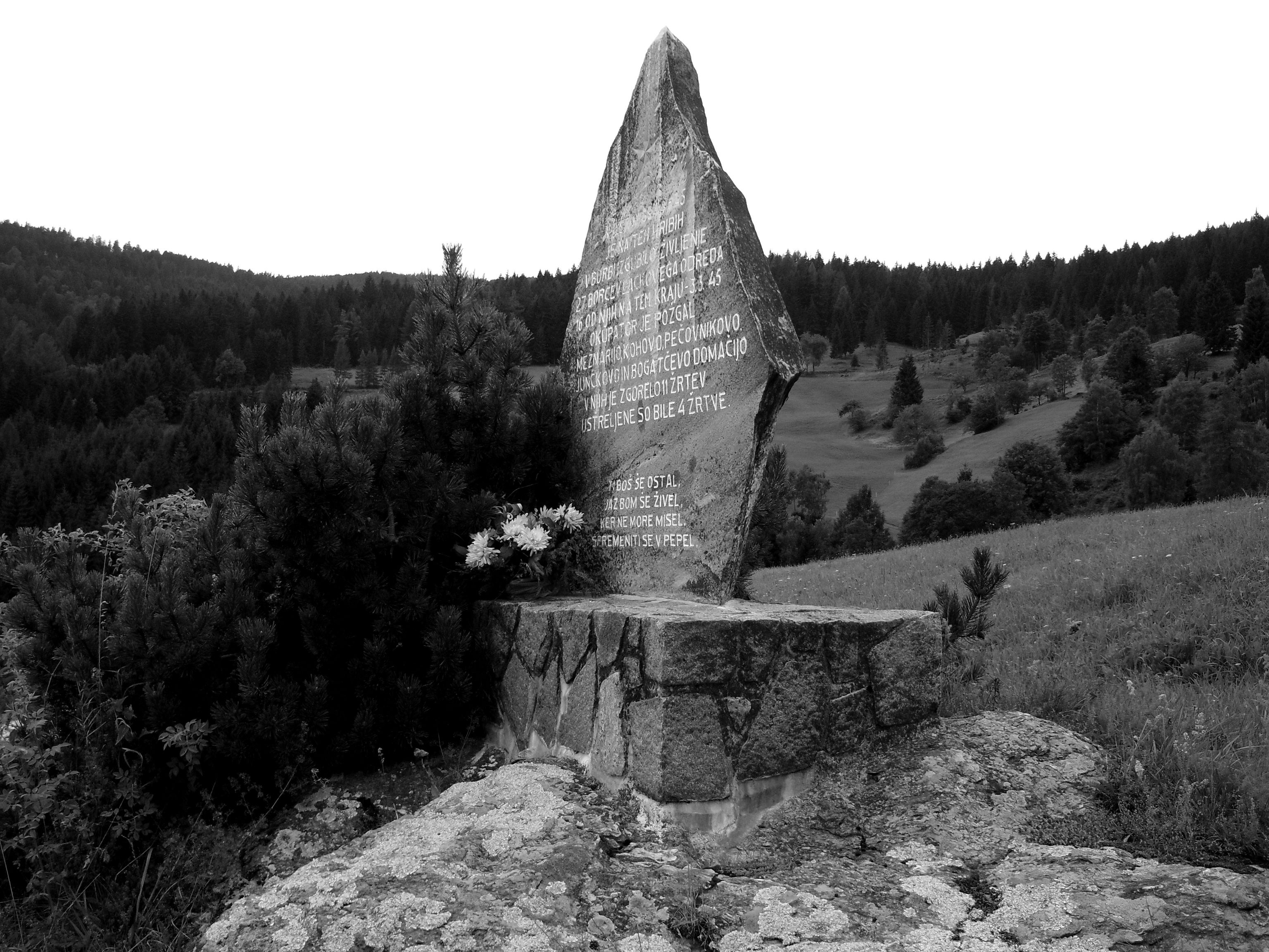 Košenjak - spomenik tregediji med NOB